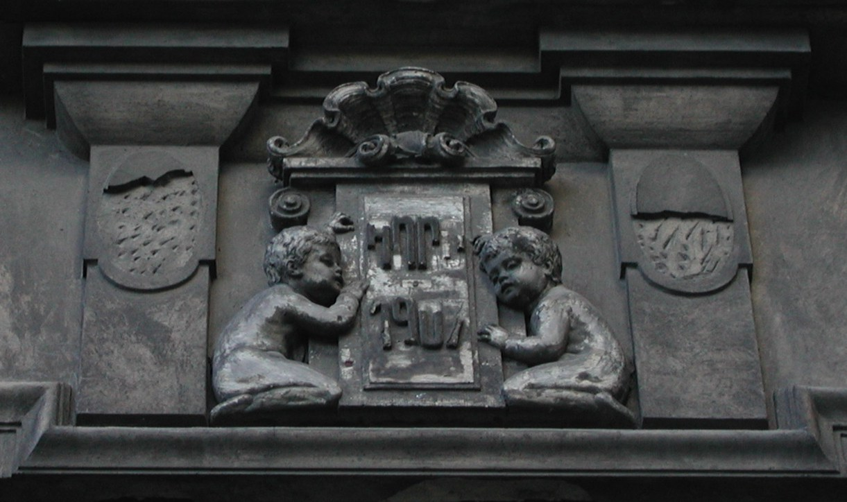 Jahreszahl am Haupt-Produktionsgebäude des ehemaligen VEB Fortschritt Herrenbekleidung